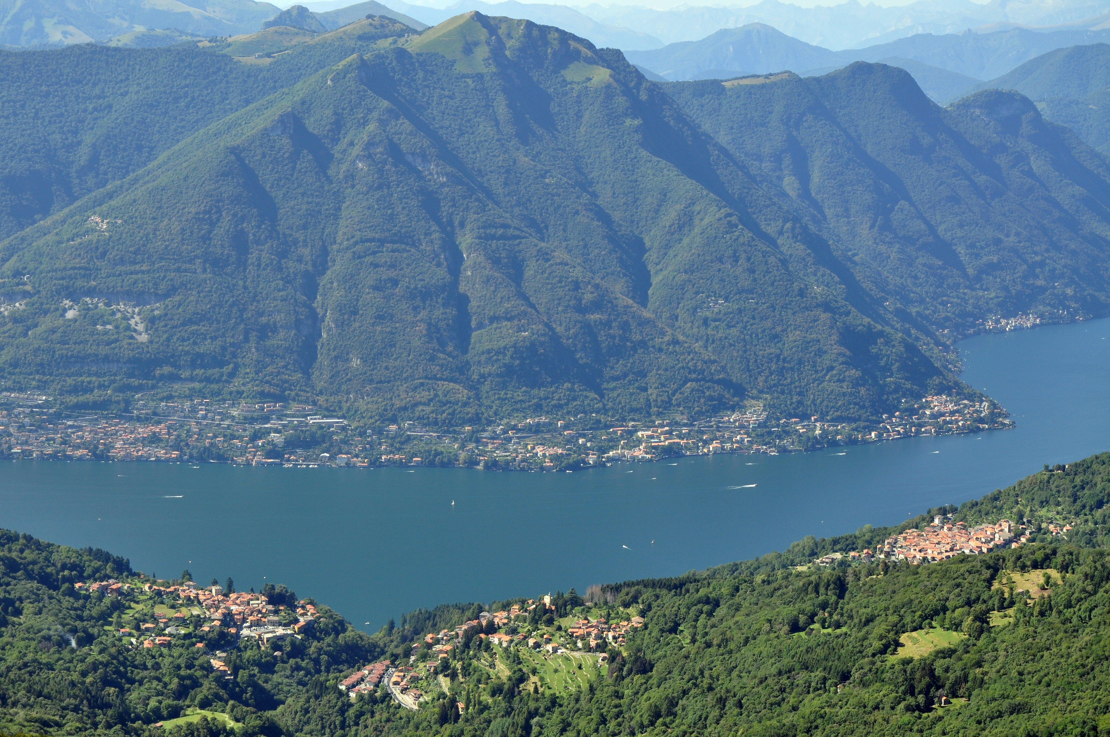 Le tre frazioni di Faggeto Lario viste dal monte Bollettone; Da sinistra Molina, Lemna e Palanzo